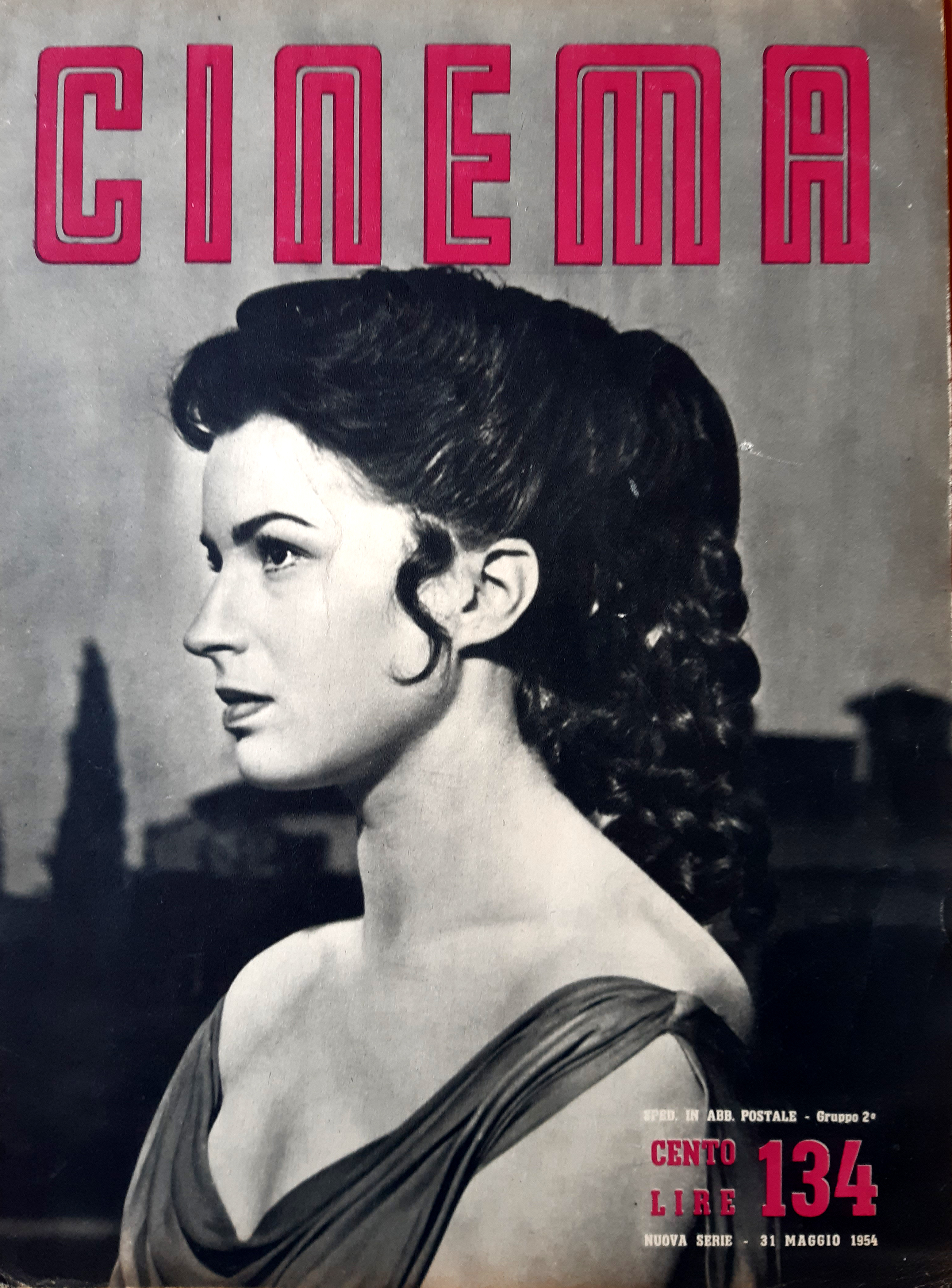 Copertina del n.134 del quindicinale Cinema uscito il 31 maggio 1954. Immagine: Silvana Mangano in Ulisse regia di Mario Camerini, 1954